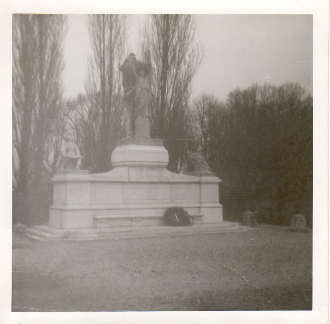 Reconstruction de l'Ecole Speciale Militaire Interarmes à Saint-Cyr L'Ecole. Le monument aux morts de l'école. La base et le soldat à gauche sur la photo ont été restaurés. La statue au centre et le soldat à droite proviennent du monument initial. Le momnument est dos au Nord à coté du « Petit bois ». La qualité est médiocre mais cette photographie a été faite avec un Agfa Isola I alors que j'ai 14 ans.